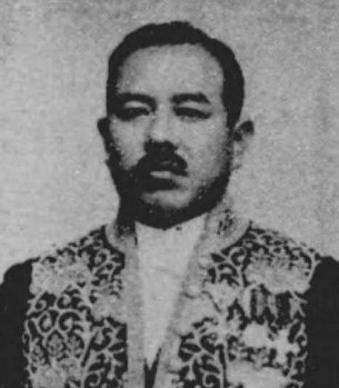 中井光次（1892-1968）